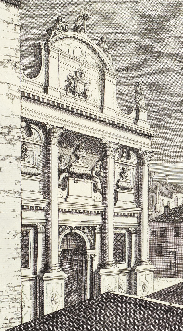 Veduta della Chiesa di Santa Giustina Monache in Venezia, dettaglio